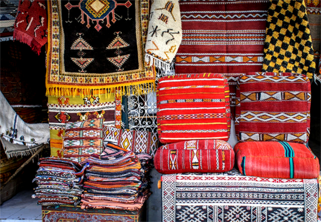 Puesto de alfombras decorativas marroquíes de varios colores